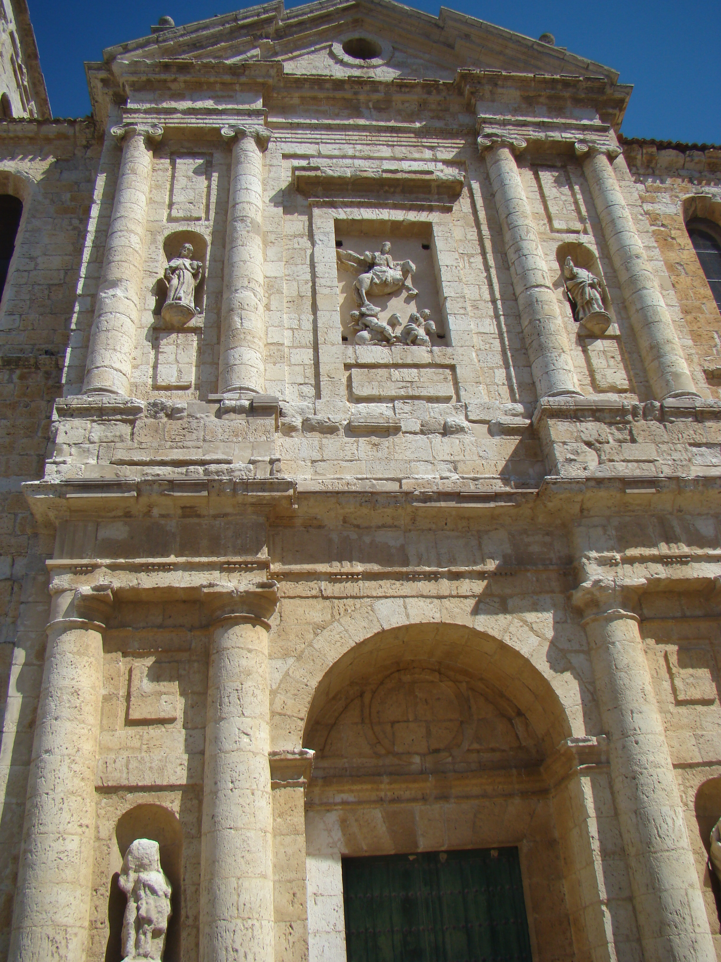 Fachada sur de la iglesia de Santiago en la localidad de Cigales, Valladolid (España). Primer cuerpo con la puerta de acceso al templo. Segundo cuerpo con la escultura de Santiago Matamoros en el centro.